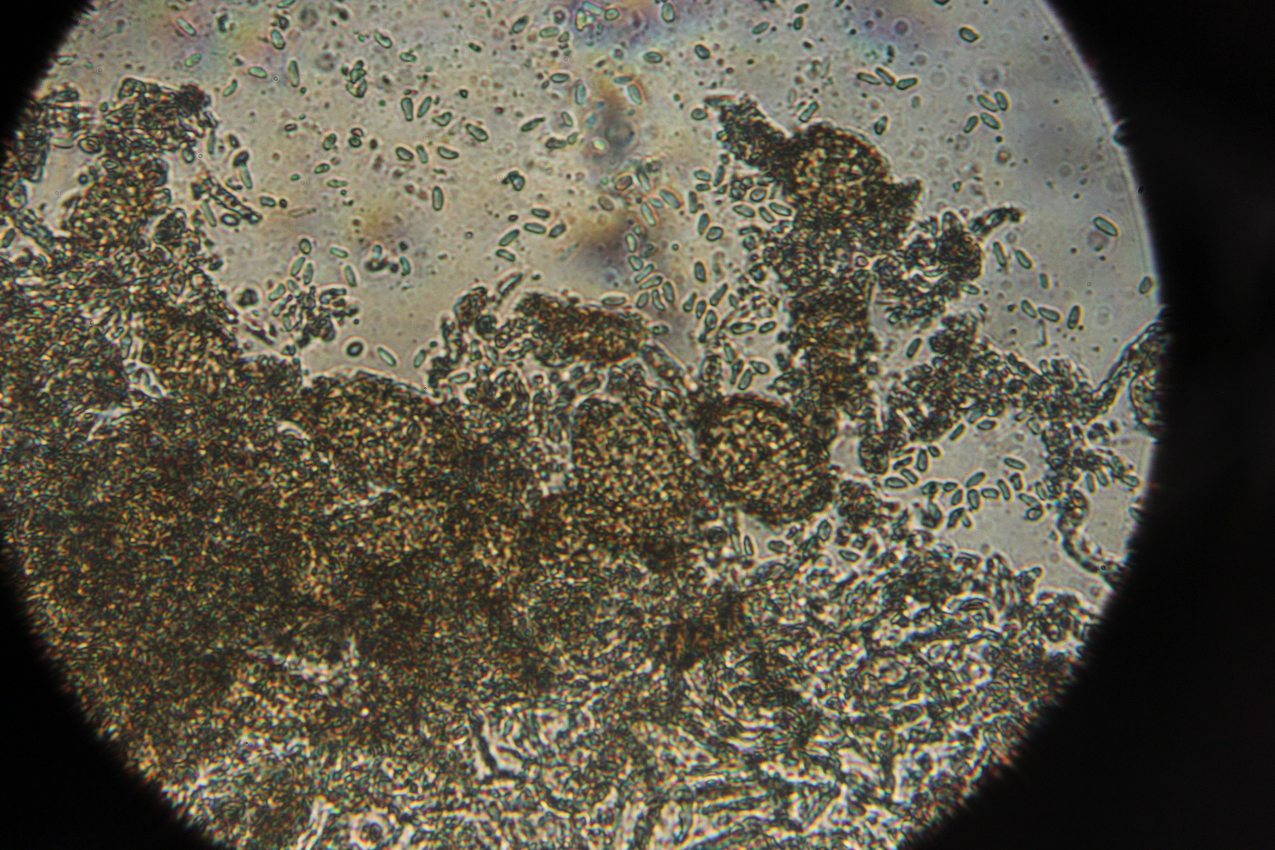 Ampelomyces quisqualis on Erysiphe euonymi on Euonymus europaeus